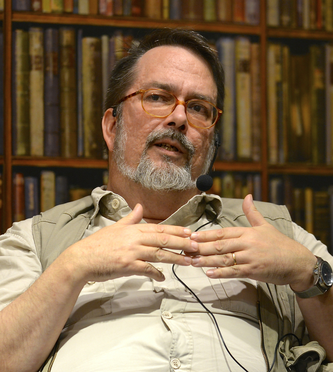 Jan Bergman samtalar om sin nya bok "Sekreterarklubben: C-byråns kvinnliga agenter under andra världskriget" i Stockholm den 13 september 2014.